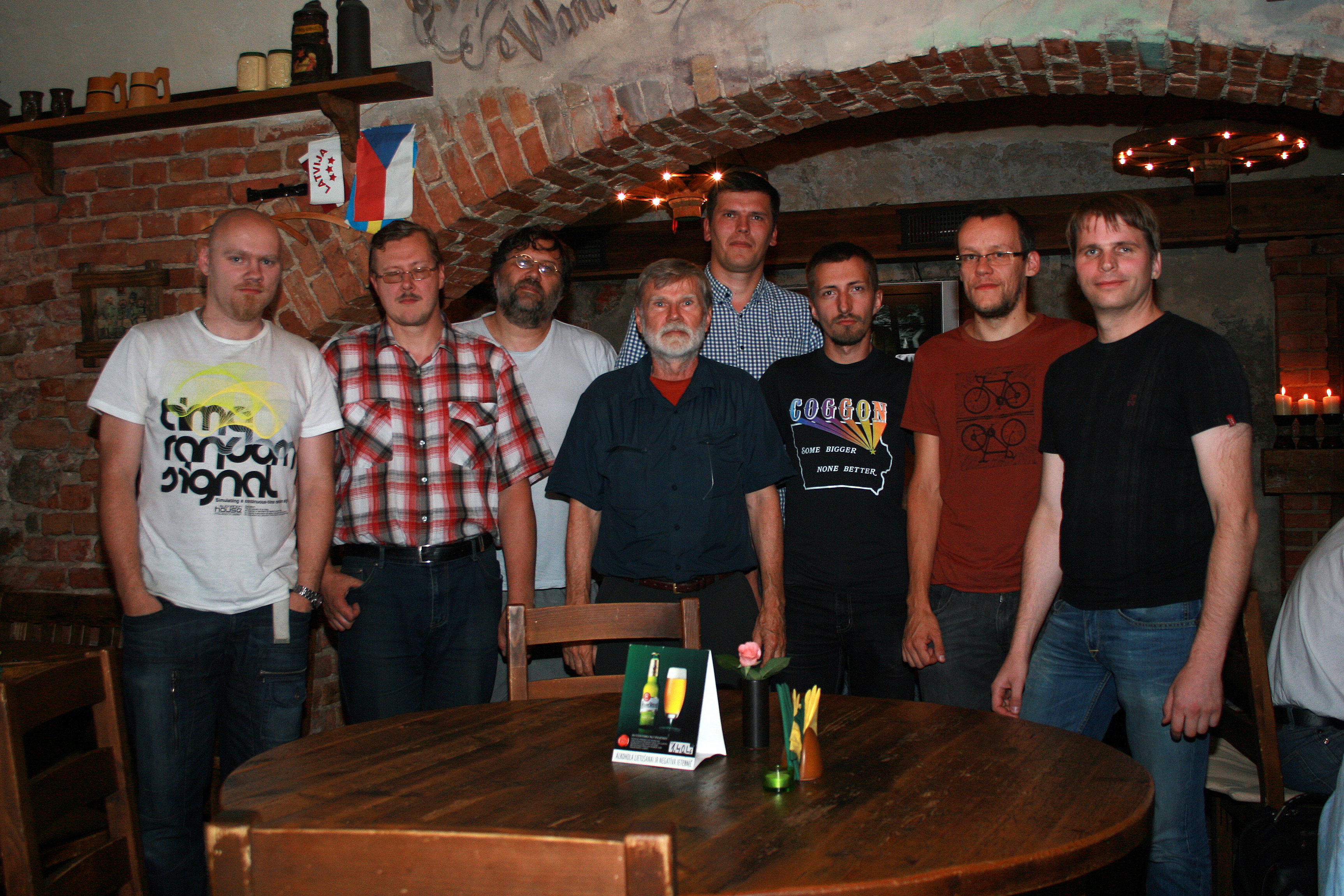 Vikialus 2013. Tikšanās par godu latviešu valodas Vikipēdijas 50 000 rakstu sliekšņa pārsniegšanai.